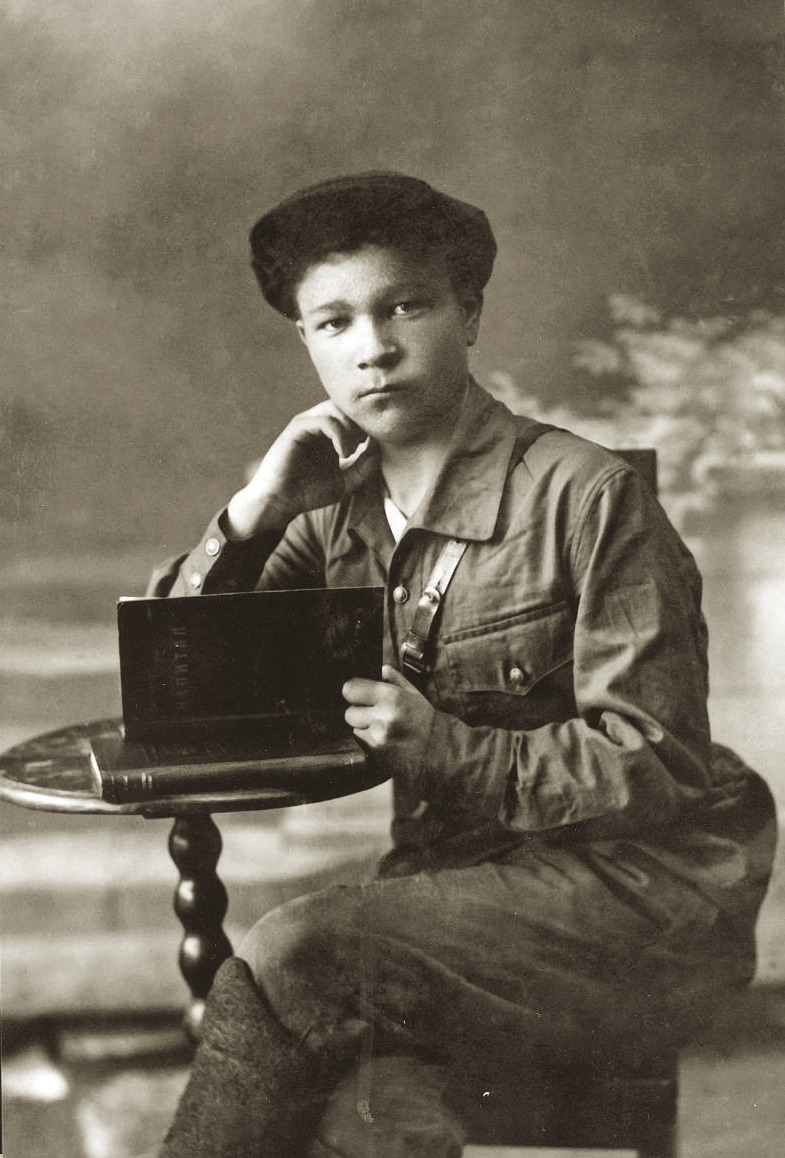 Александр Михайлович Тураев в 1927 году